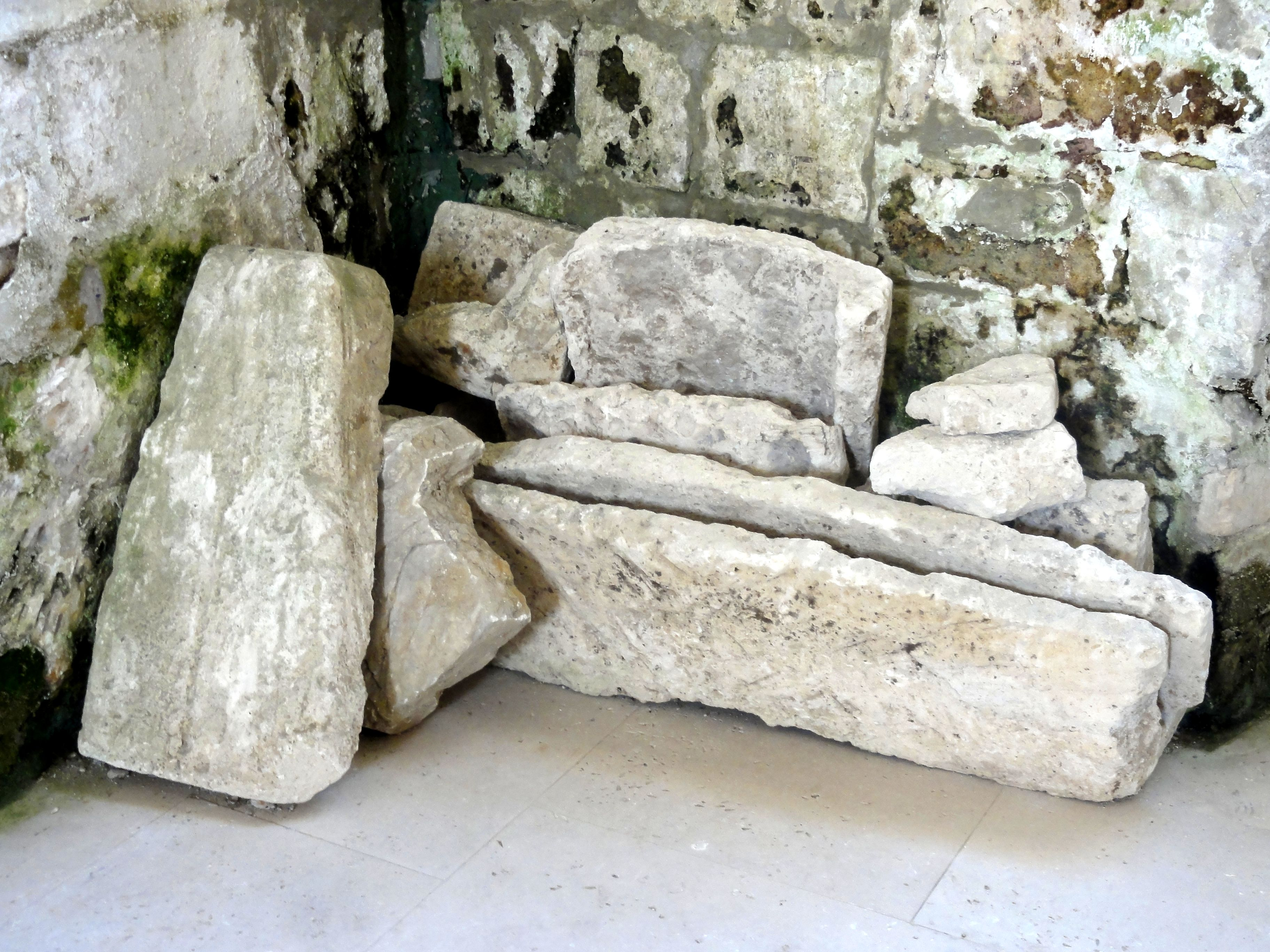 Croisillon nord, vestiges de sarcophages en pierre retrouvées lors de la réfection du sol.